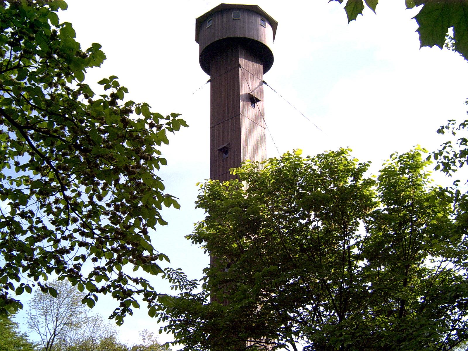 Turm der Einheit